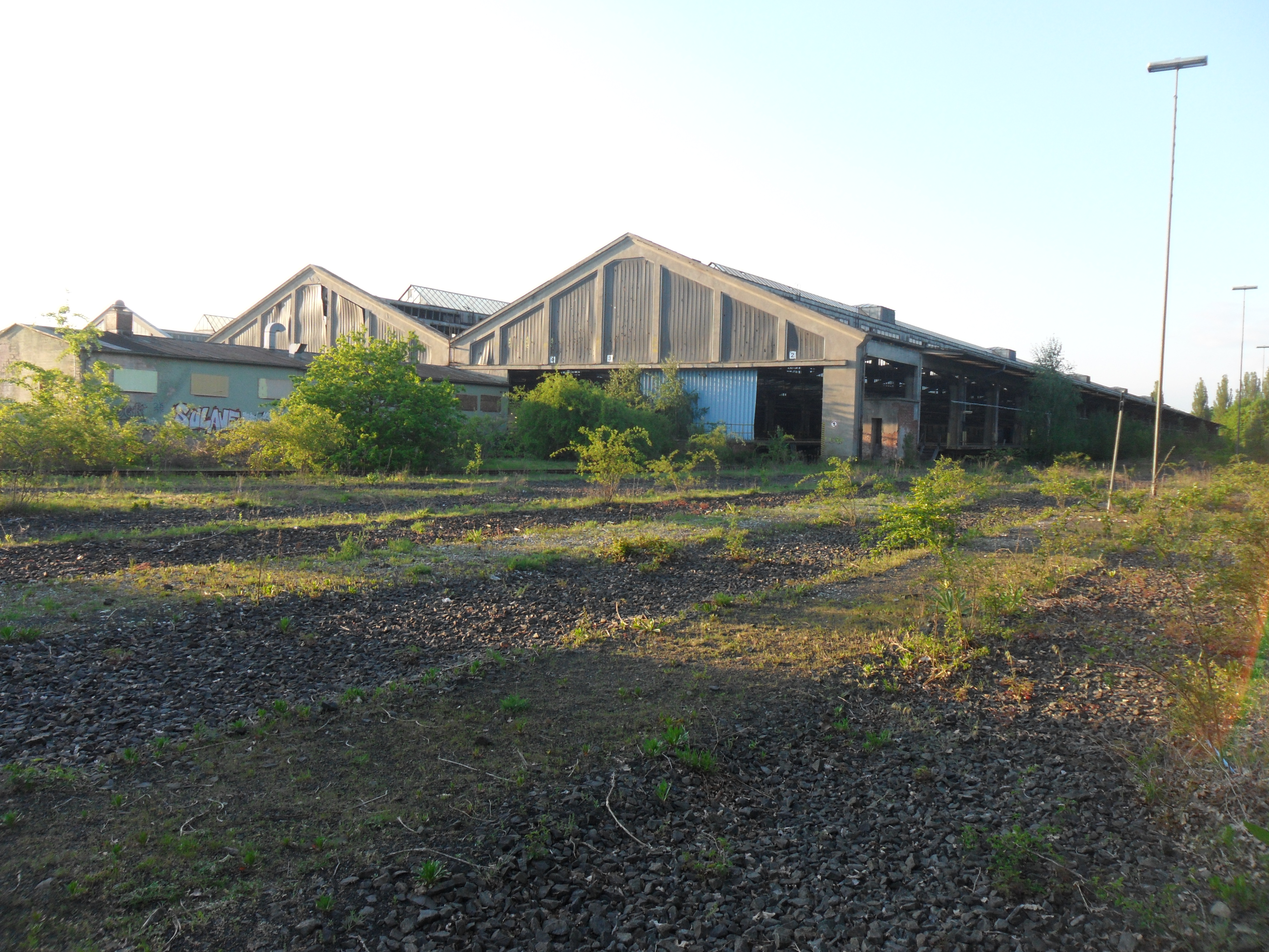 Das alte Bahngelände befindet sich zwischen der Münchener Straße im Osten und der Brunecker Straße im Westen im äußersten Norden des statistischen Bezirkes Nr. 41 Rangierbahnhof im Stadtteil Nr. 4 Südliche Außenstadt.